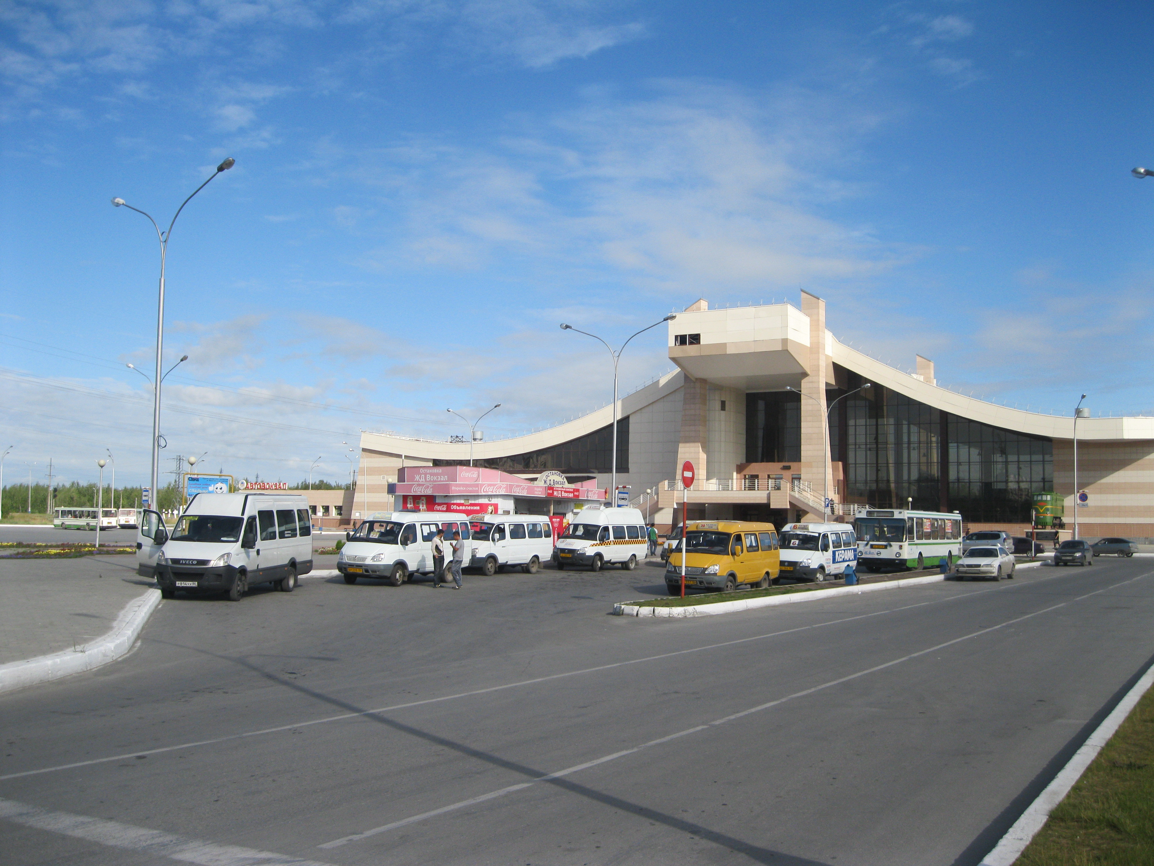 Автобусная конечная Ж/Д в Нижневартовске.